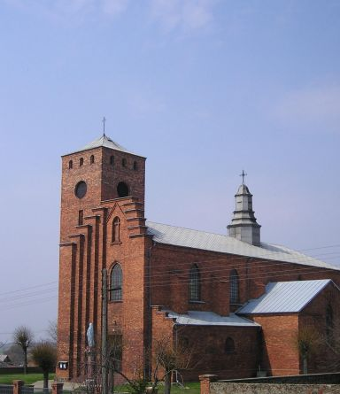 Kościół pw. Św. Marii Magdaleny w Ożarowie woj. łódzkie.